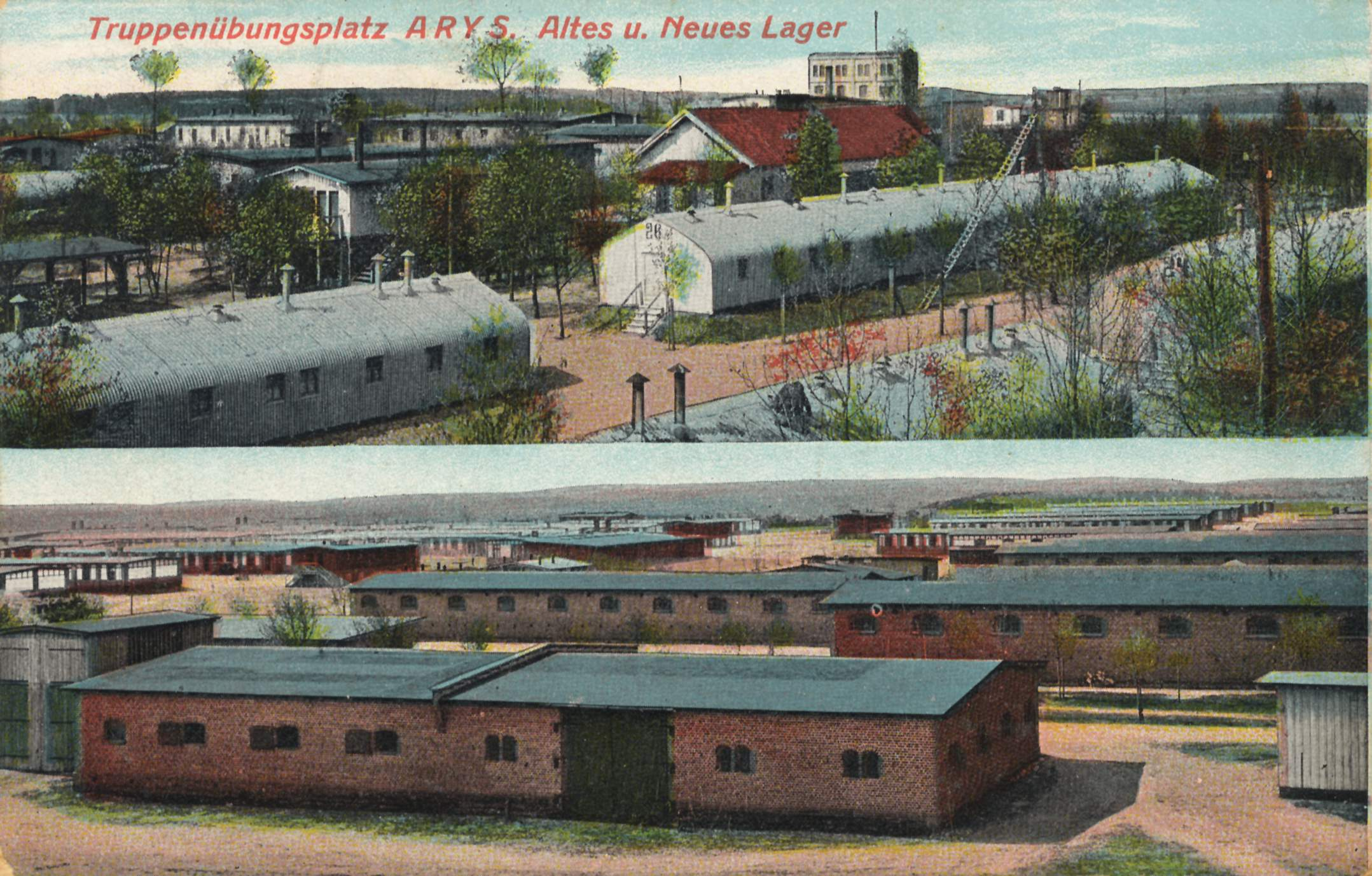 Koszary w Orzyszu